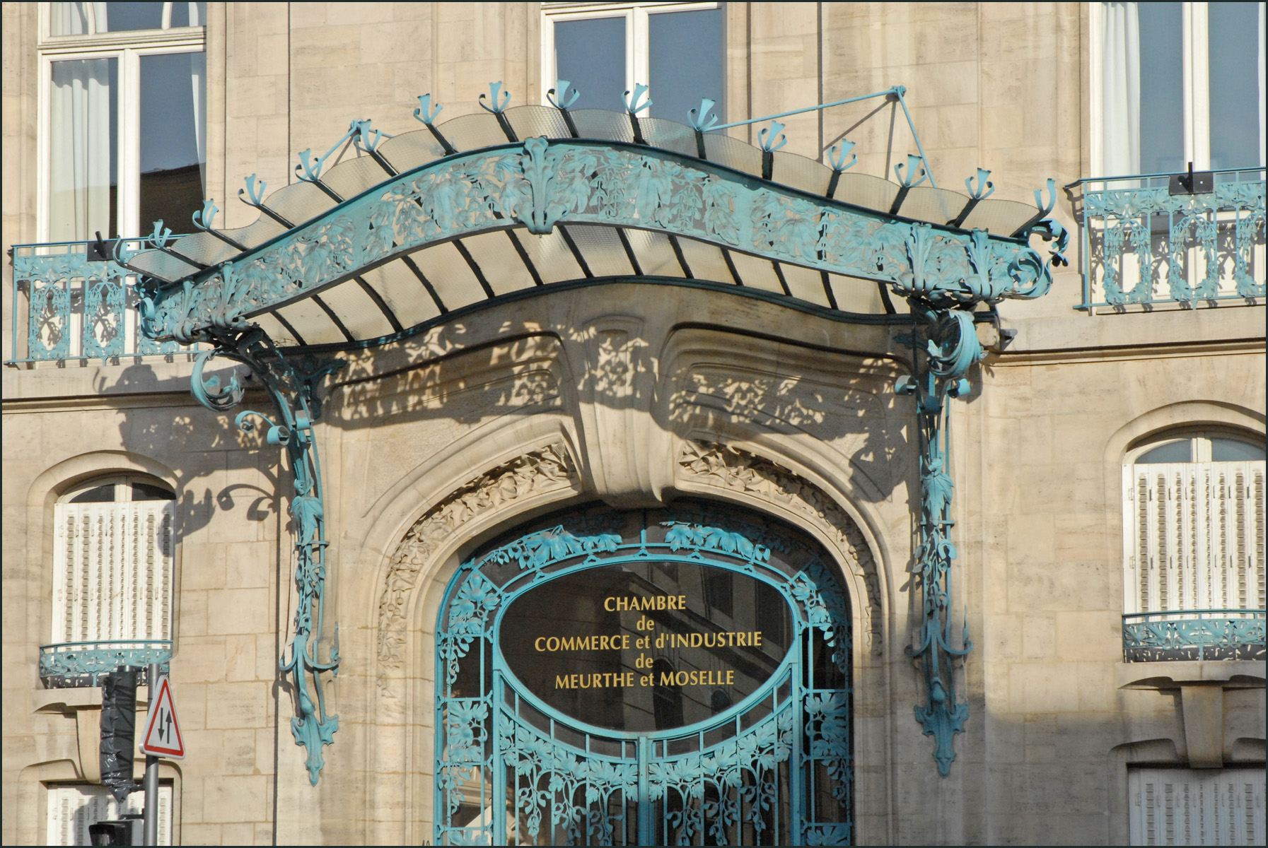 La Chambre de Commerce et d’Industrie de Meurthe-et-Moselle a été inaugurée en juin 1909. Elle est installée dans un bâtiment Art Nouveau auquel ont contribué les plus grands créateurs de l’École de Nancy : les architectes Louis Marchal et Émile Toussaint pour le bâtiment ; Antonin Daum et Jacques Gruber pour les vitraux; Louis Majorelle pour les ferronneries.